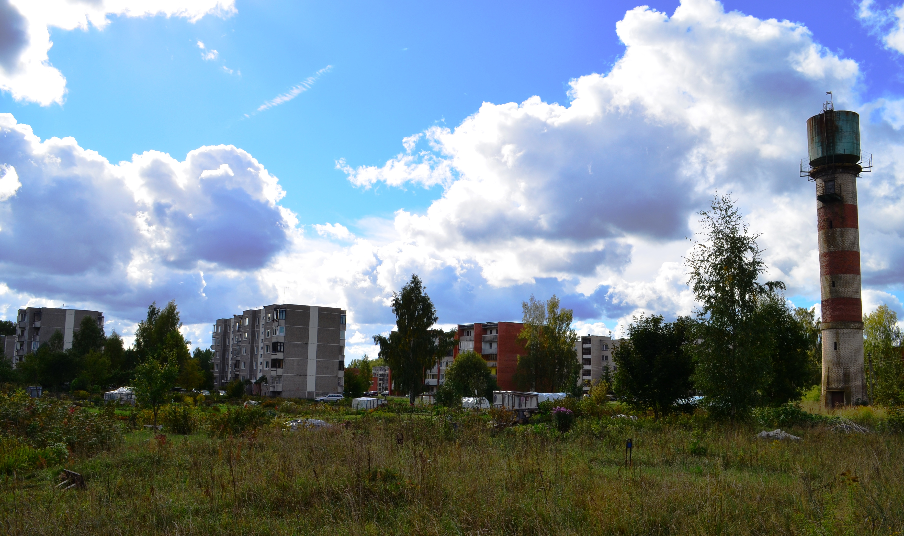 Sodų g., Skaidiškės, Vilniaus r.